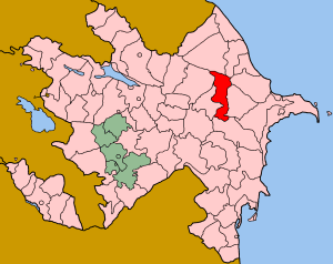 Map of Azerbaijan showing Shamakhi (Şamaxı) rayon.